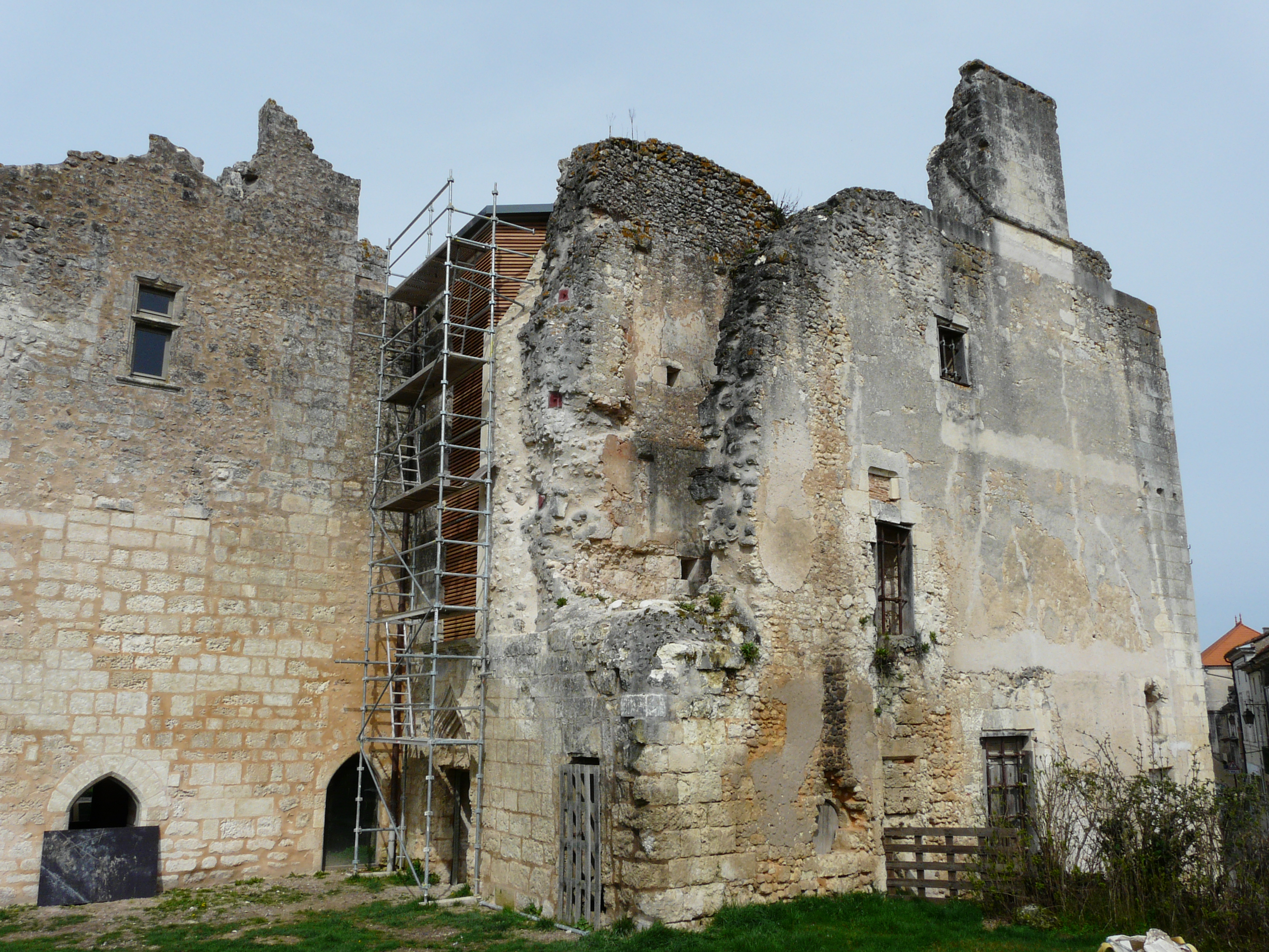 Les ruines du château Barrière, Villamblard, Dordogne, France.